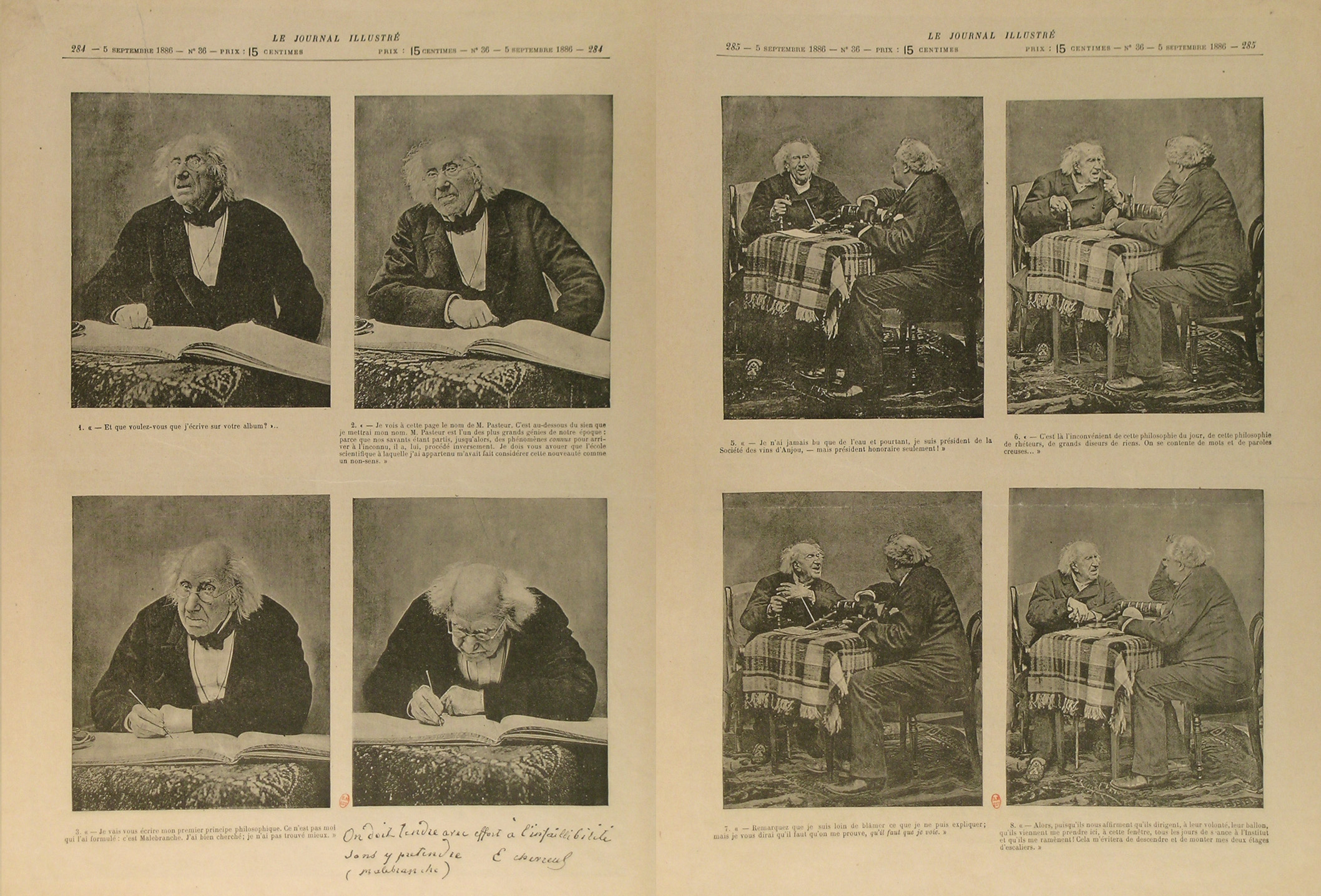 Le Journal illustré, 23e année, n° 36, 4 septembre 1886, p. 284-285.